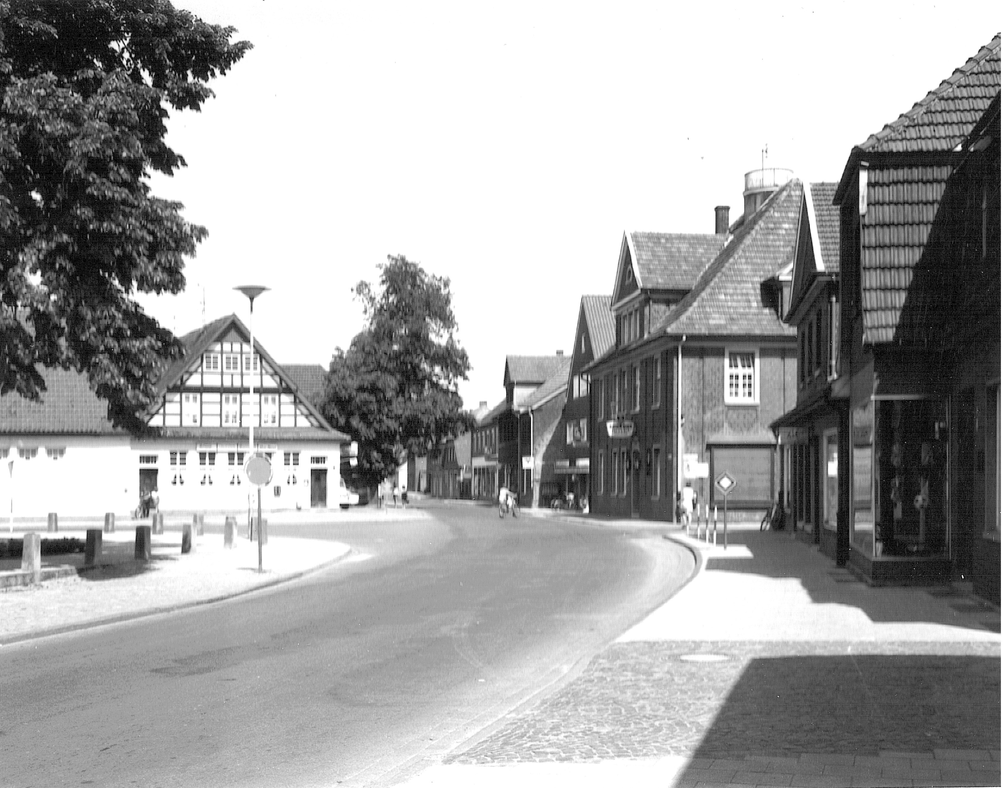 Die Sachenrast an der Kreuzung kurz vor dem Abriss